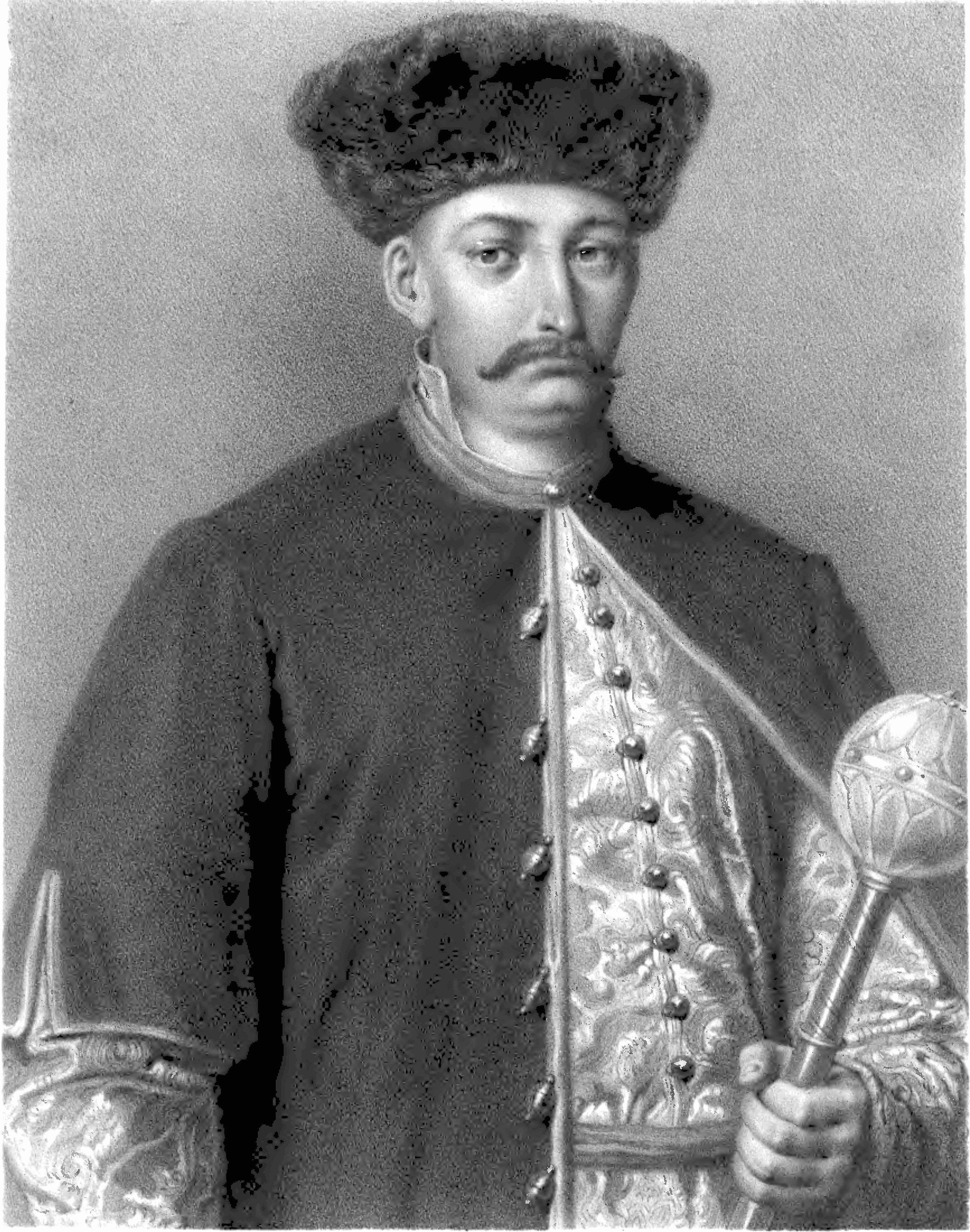 Andrzej Sapieha herbu Lis (ur. 1539, zm. 1611) - kolejno: podczaszy wielki litewski. kasztelan miński, wojewoda połocki i smoleński.